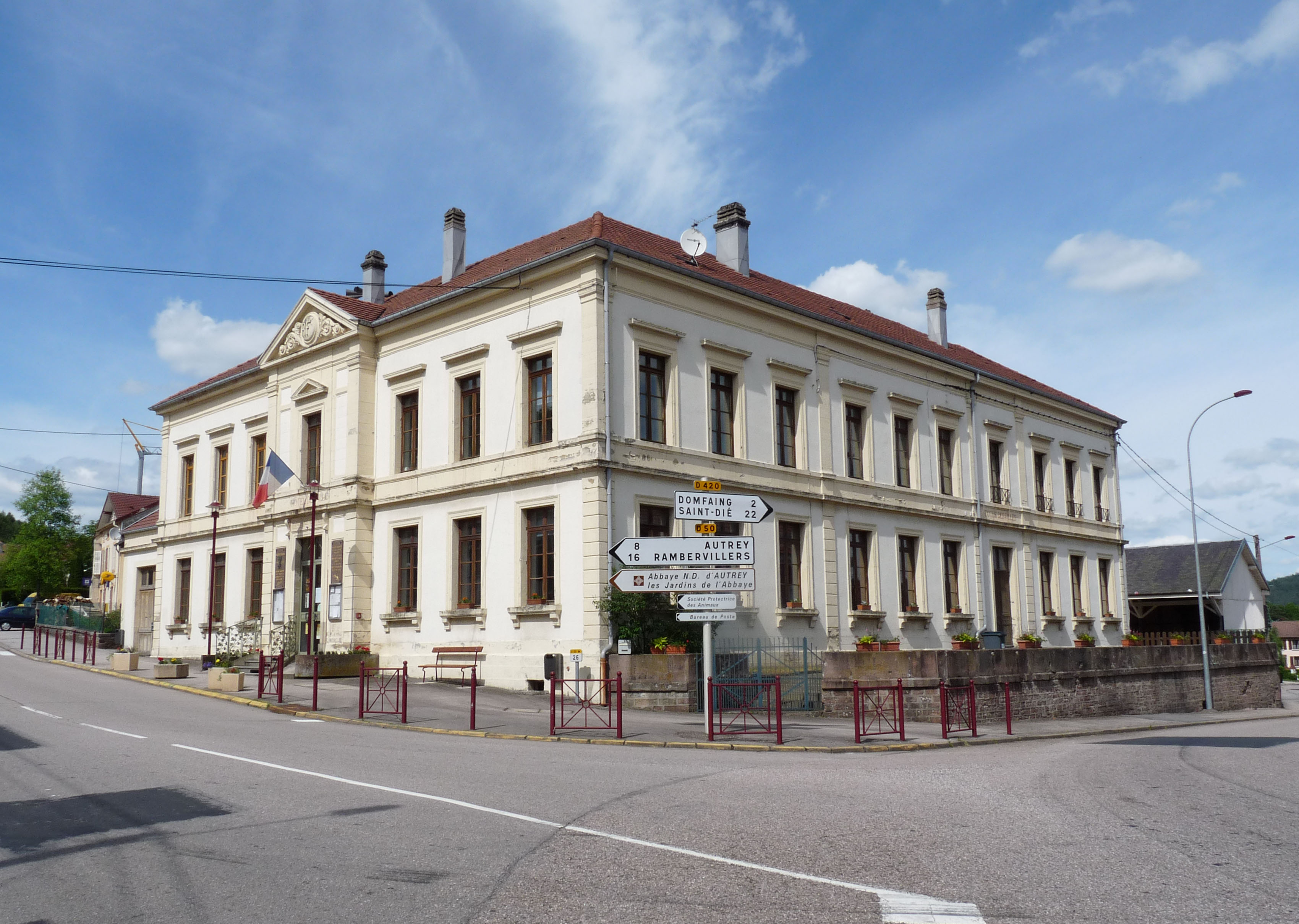 Hôtel de ville de Brouvelieures (Vosges)